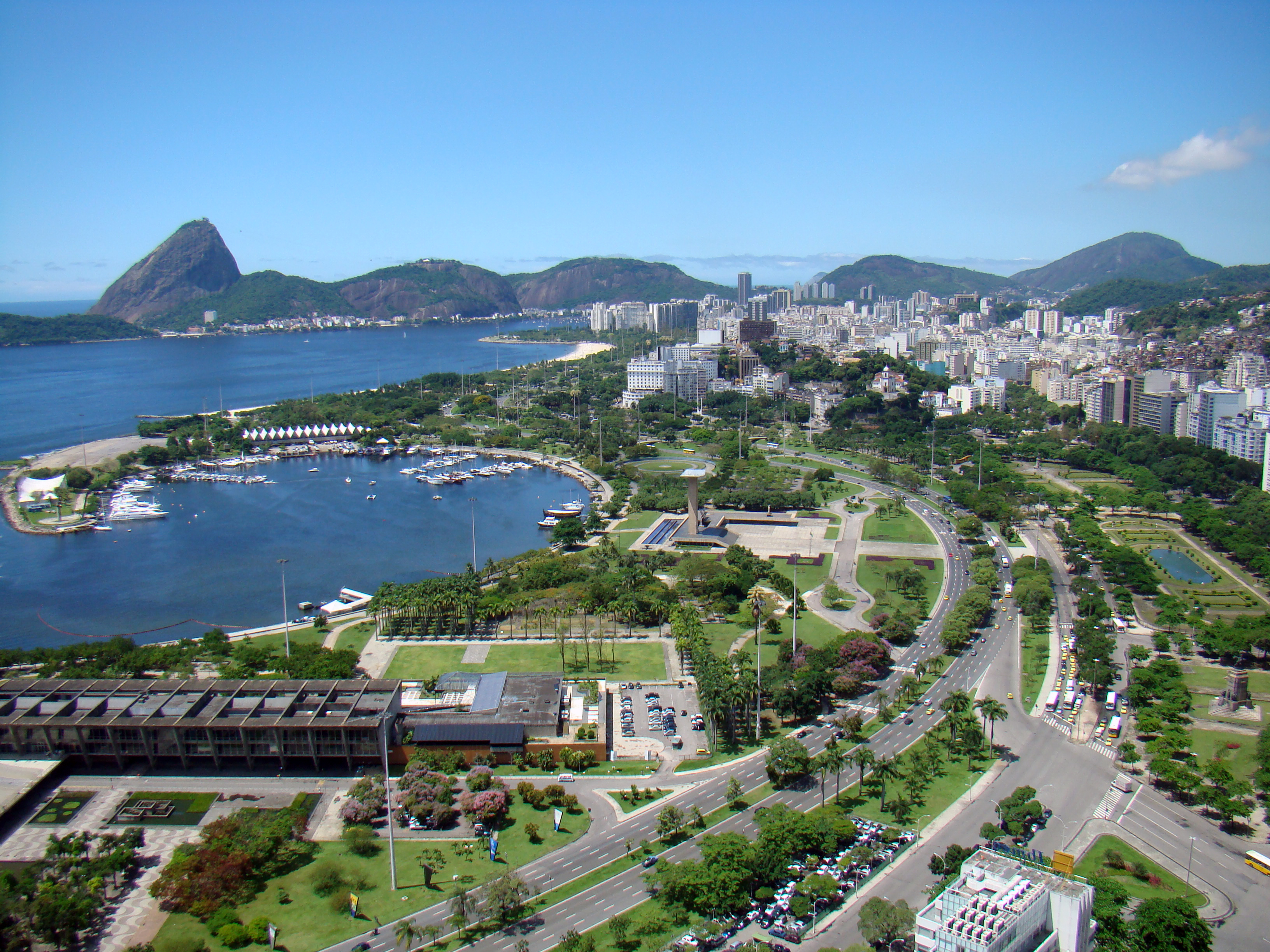 Foto tirada do Edificio Santos Dumont No Centro do Rio.